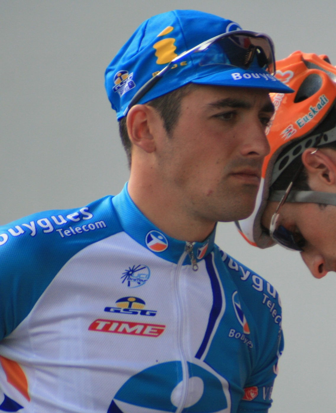 Sébastien Turgot, à l'Eneco Tour 2008, à Ardooie